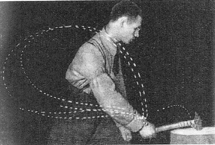 Description Циклограмма рубки зубилом. А.К. Гастев в педагогической лабаратории ЦИТ Date1922-1924Source«Трудовые установки», М., ЦИТ, 1924Authorавтор лого неизвестен, скан - собственная работа Циклограмма рубки зубилом. А.К. Гастев в педагогической лабаратории ЦИТ